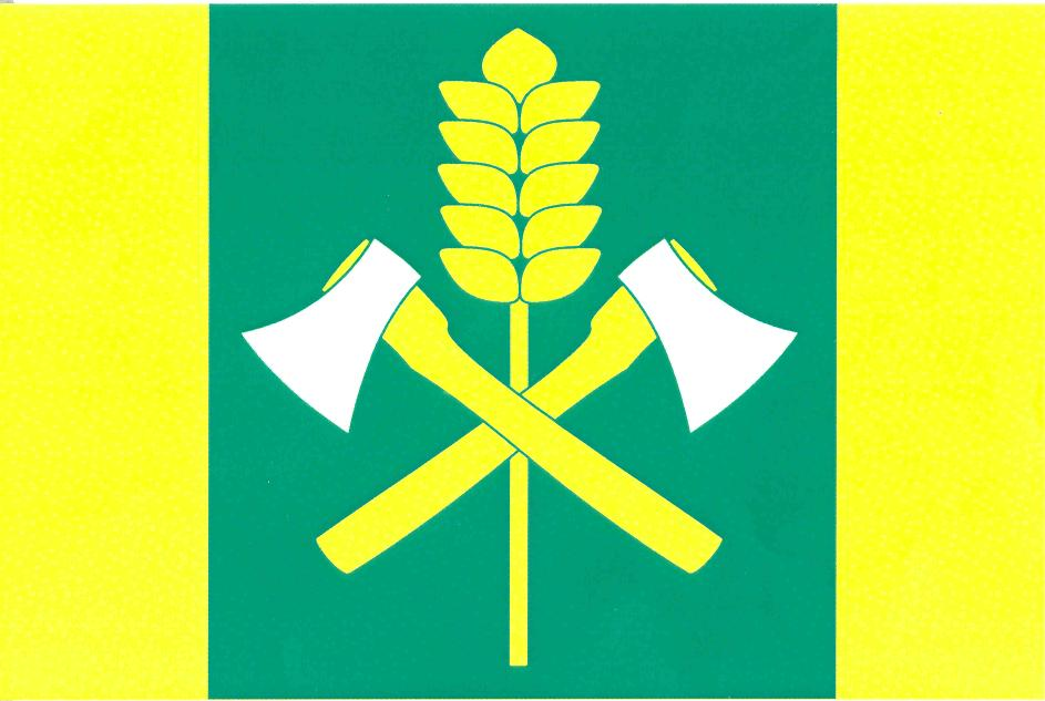 Vlajka obce Sukorady (okres Mladá Boleslav)